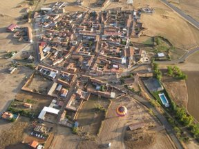 Foto aerea de Matanza de los Oteros (León - Castilla y León - España)